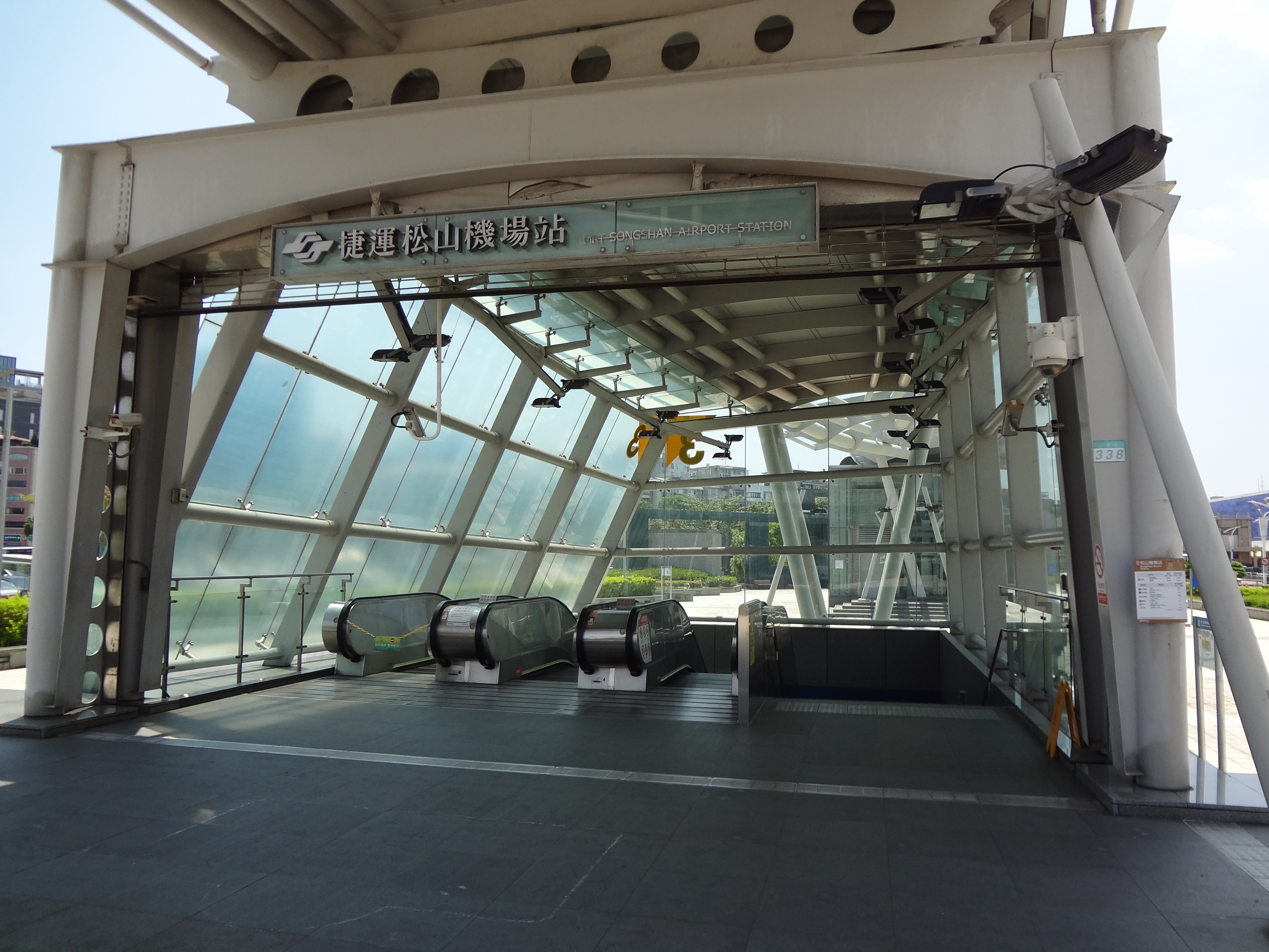 臺北捷運松山機場站3號出口。